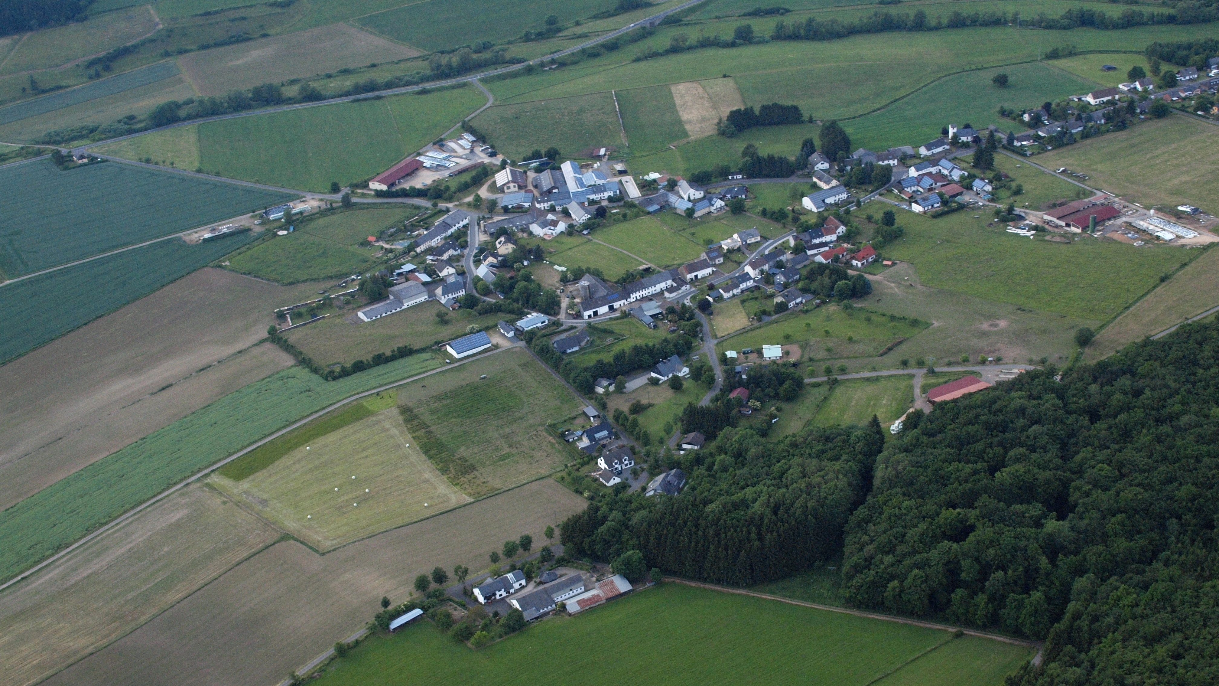 Oos (Gerolstein), Luftaufnahme (2015)